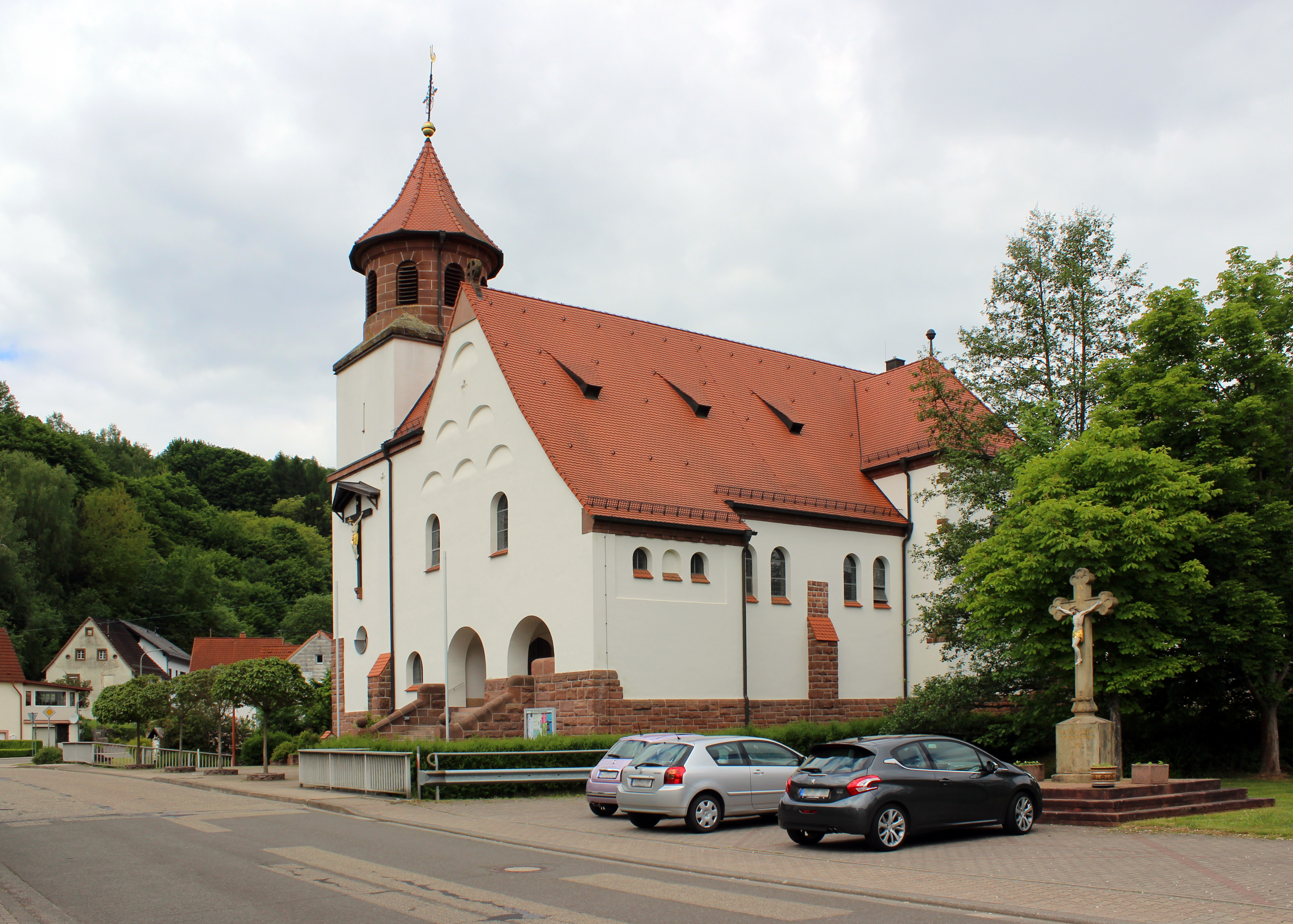 Katholische Pfarrkirche Mariä Himmelfahrt in Wiesbach (Pfalz), Landkreis Südwestpfalz, Rheinland-Pfalz